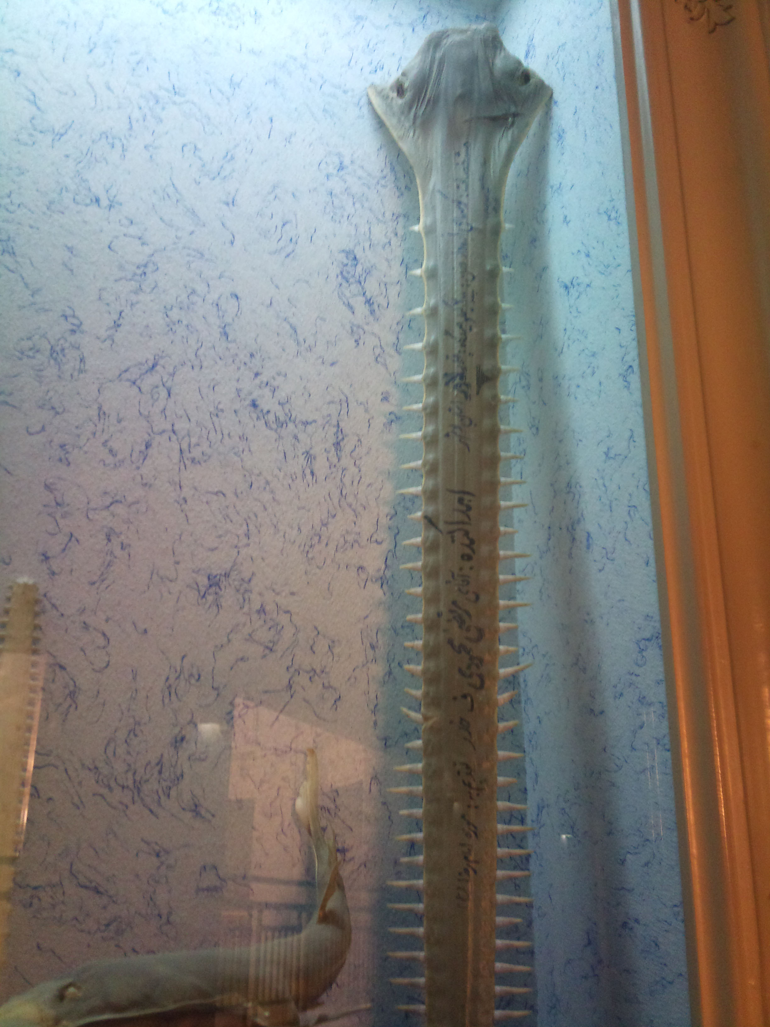 Mashhad museum